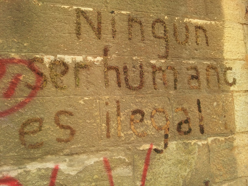 Graffiti en mousse sur le mur de l'église du Bon-Pasteur à Lyon (France) : "ningún ser humano es ilegal" (aucun être humain n'est illégal)